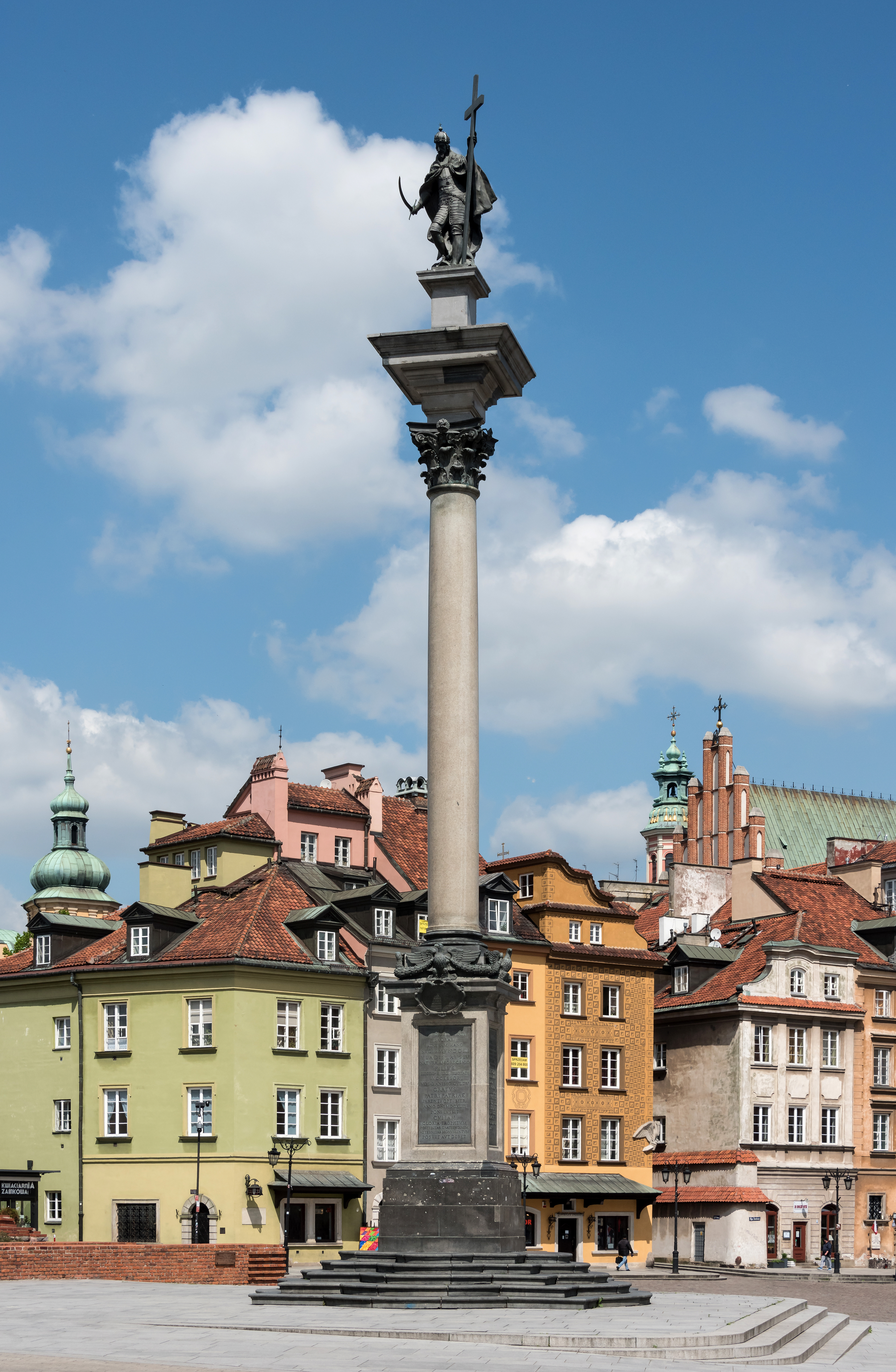 Kolumna Zygmunta III Wazy w Warszawie